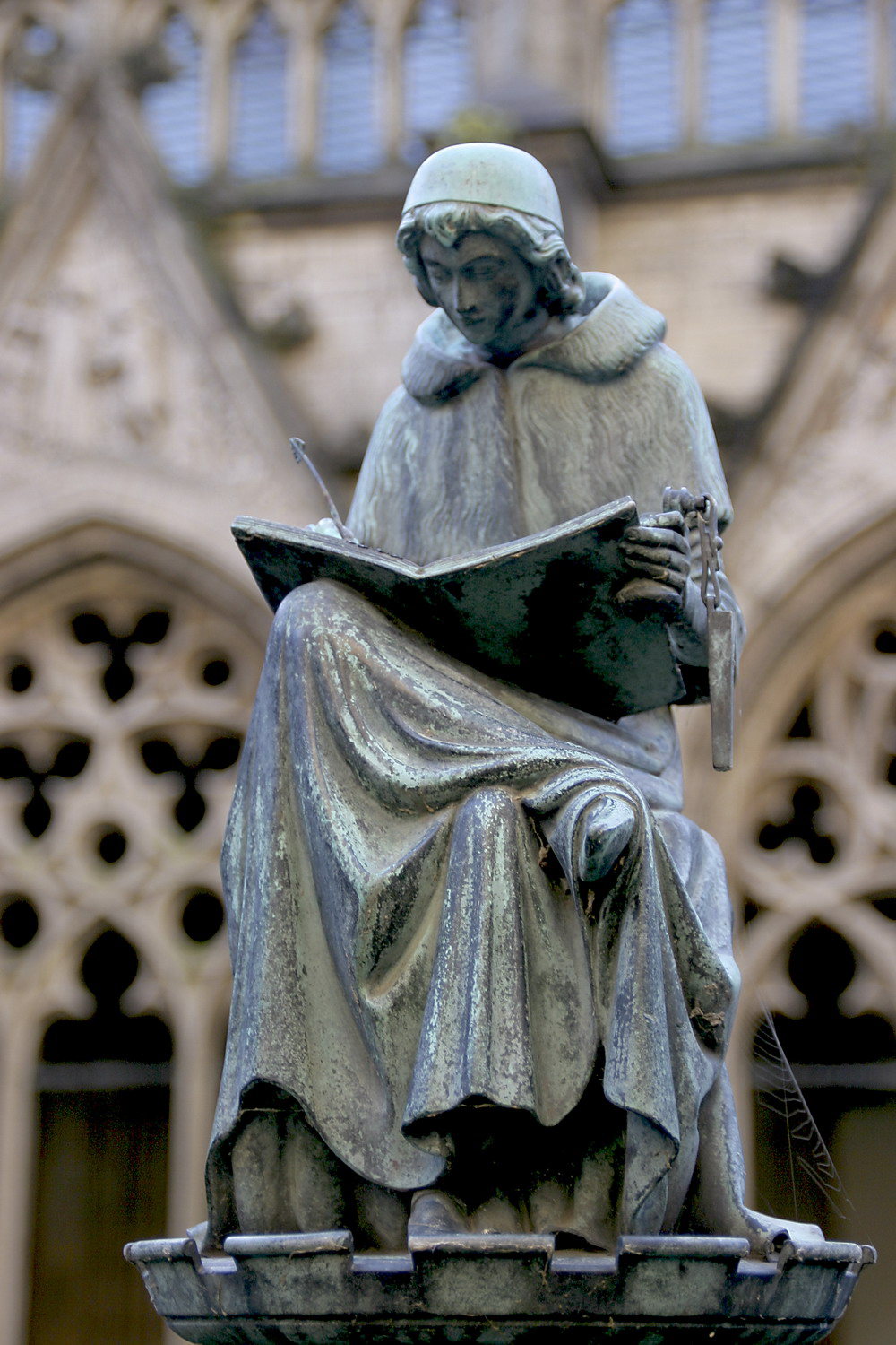 Het beeldje van de lezende kanunnik (Hugo Wstinc) in kloostertuin het Pandhof van de Domkerk in Utrecht